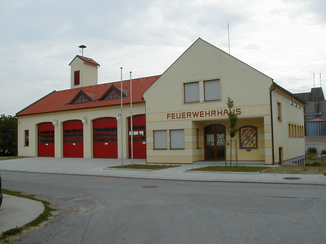 Feuerwehrhaus